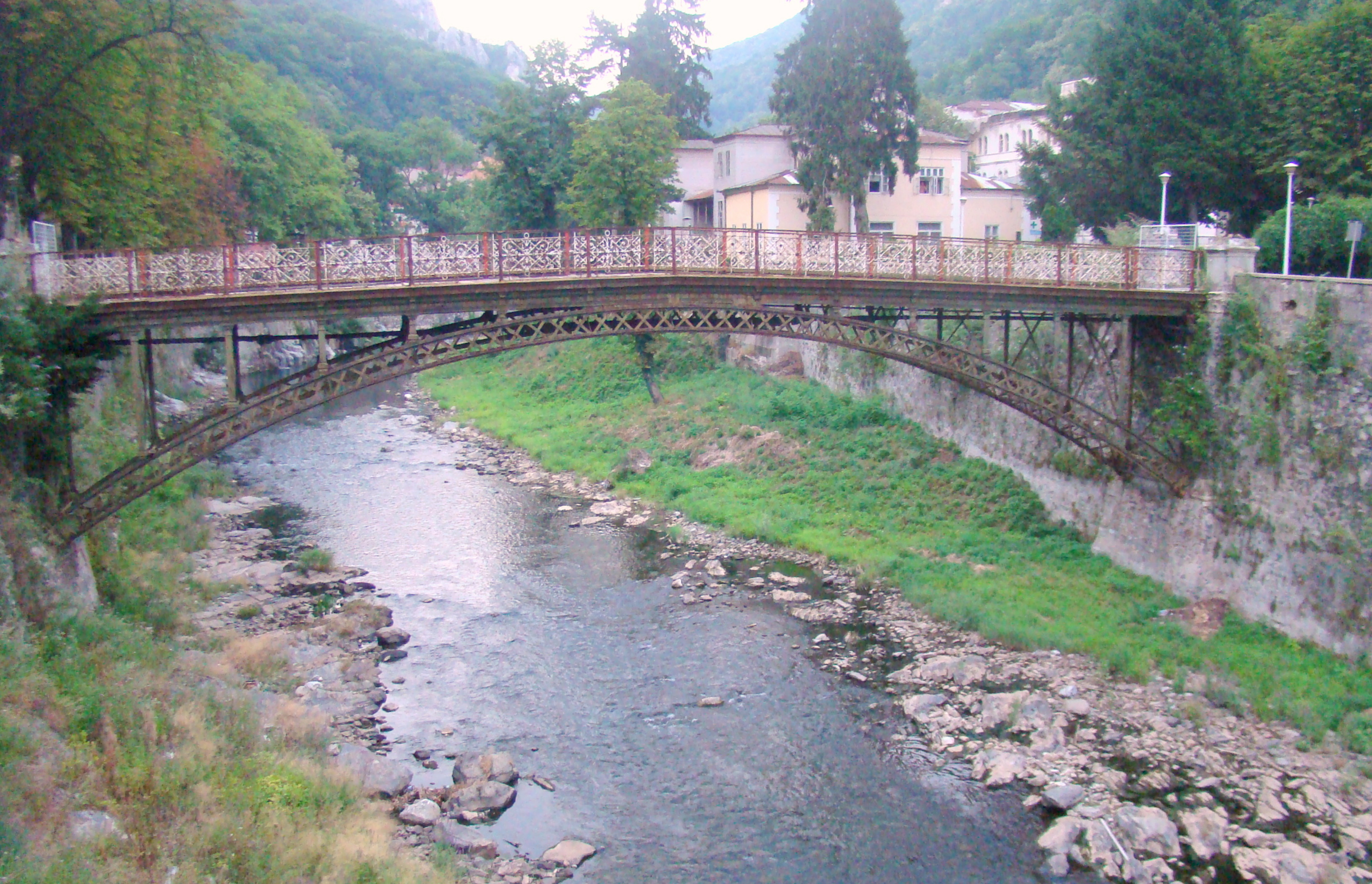 Podul din fontă peste Cerna, oraș Băile Herculane, între străzile Cerna și Izvor, în fața Băii „Neptun”